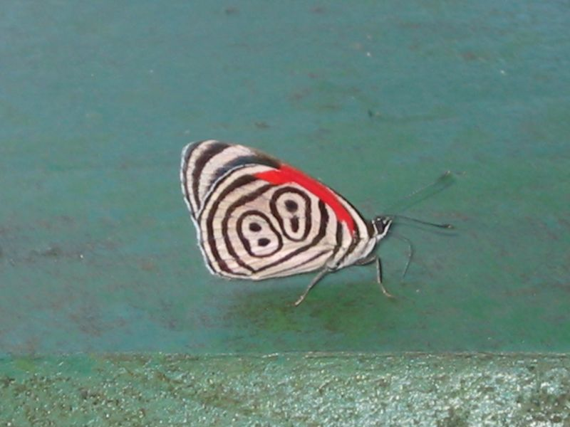 Butterfly (Diaethria anna), Brazil